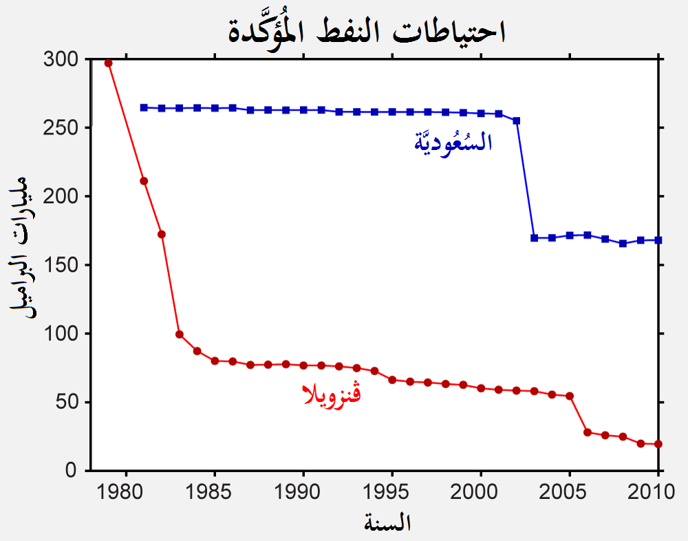 رسمٌ بياني يُبيِّن احتياطيات النفط المُؤكدة في ڤنزويلا وفي السُعُوديَّة. خِلال شهر كانون الثاني (يناير) 2011، زعمت ڤنزويلا أنَّها تفوَّقت على السُعُوديَّة من حيث امتلاكها أكبر احتياطي نفط في العالم.